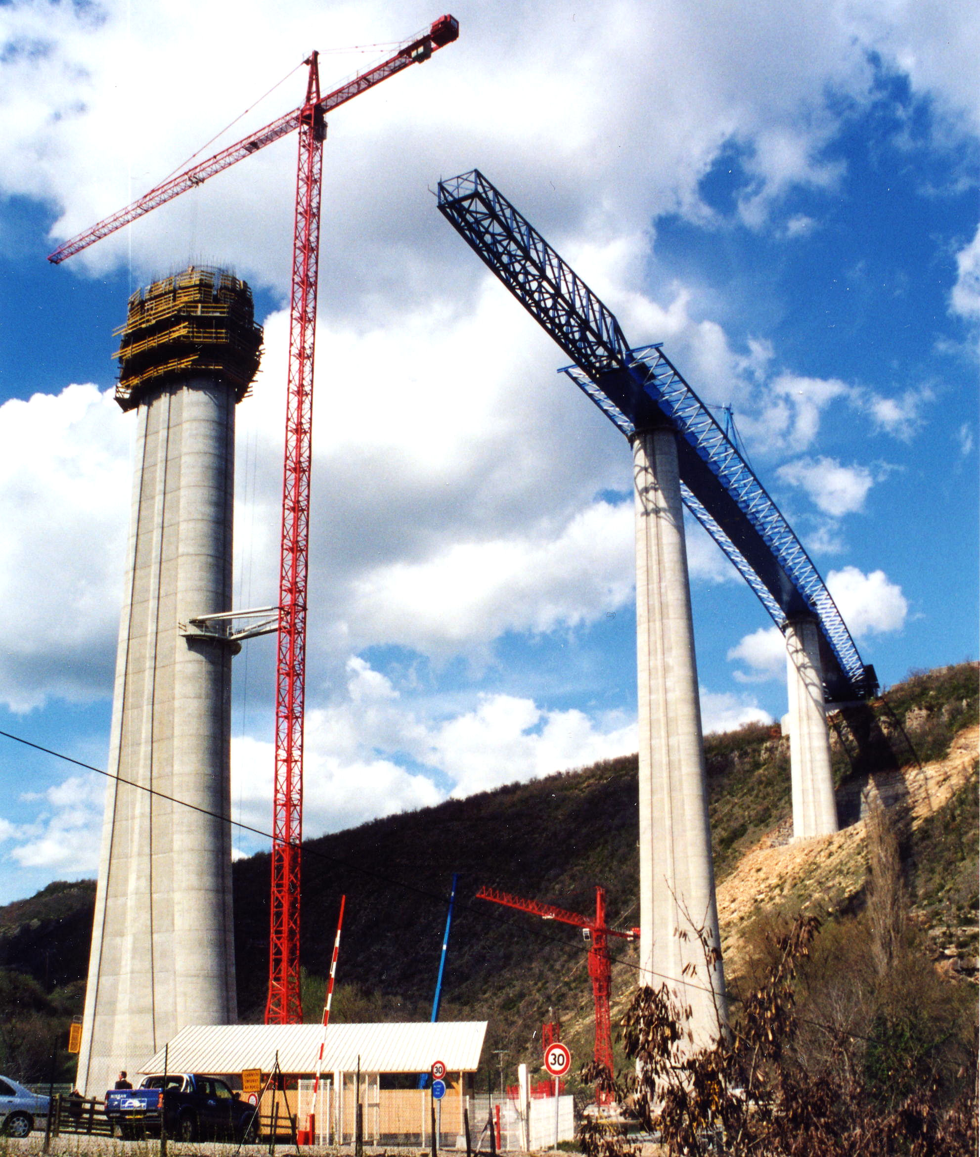 Autoroute A75 - Le viaduc de Verrières en cours de construction